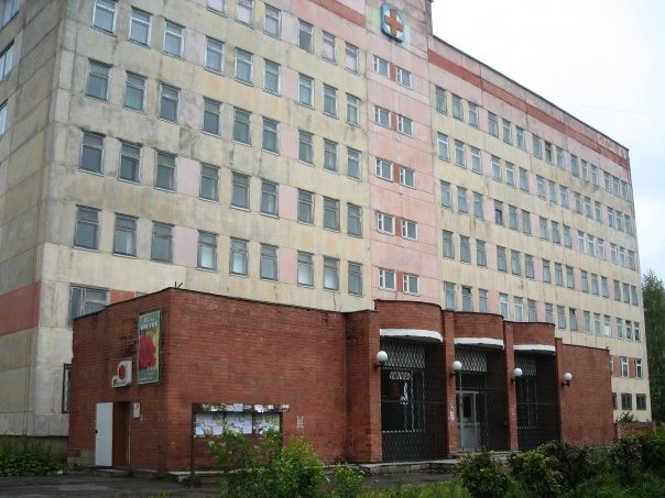 Вид на поликлинику